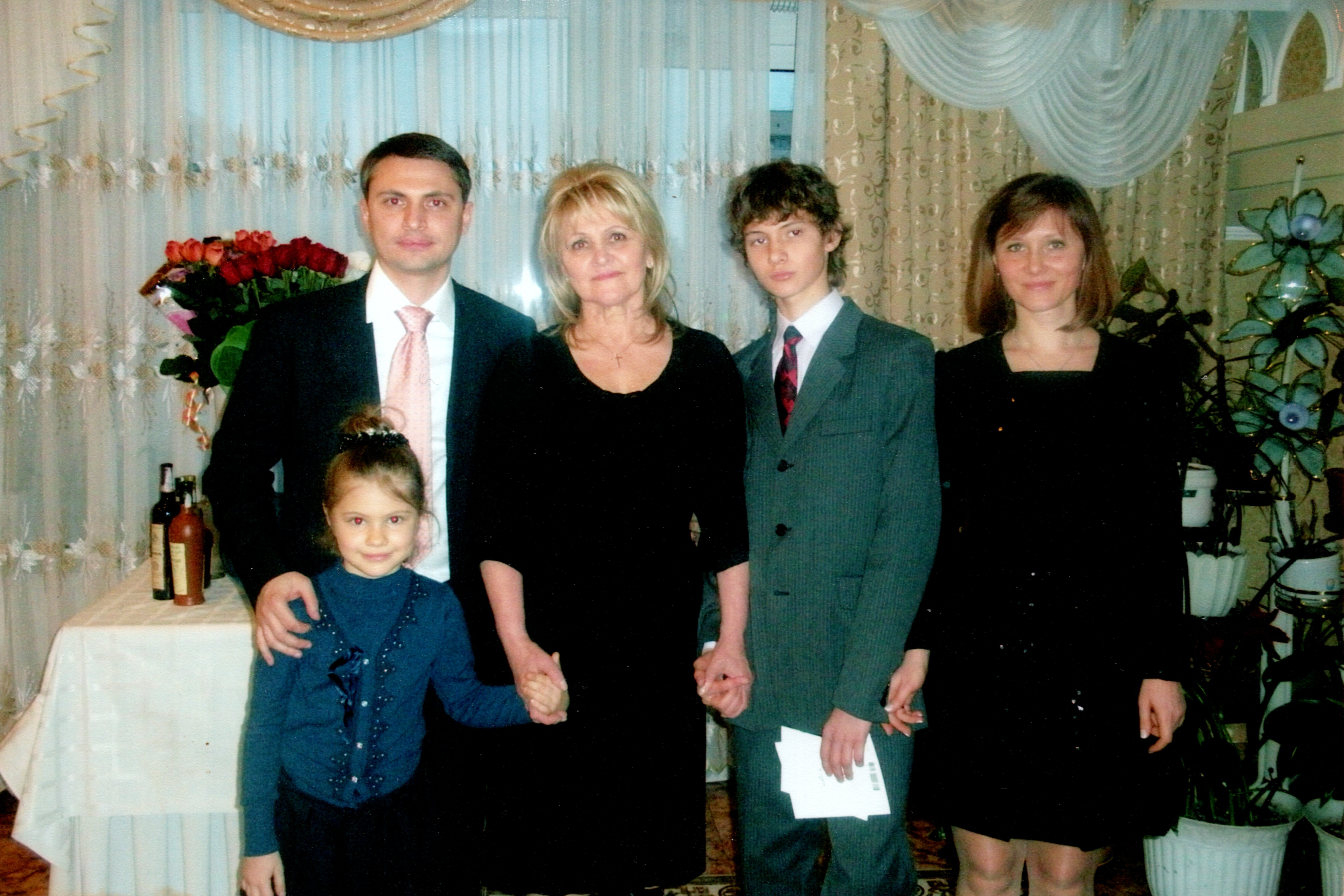 Родина Падалко Людмили Іванівни: син Геннадій, невістка Наталія, онуки Людмила та Вадим